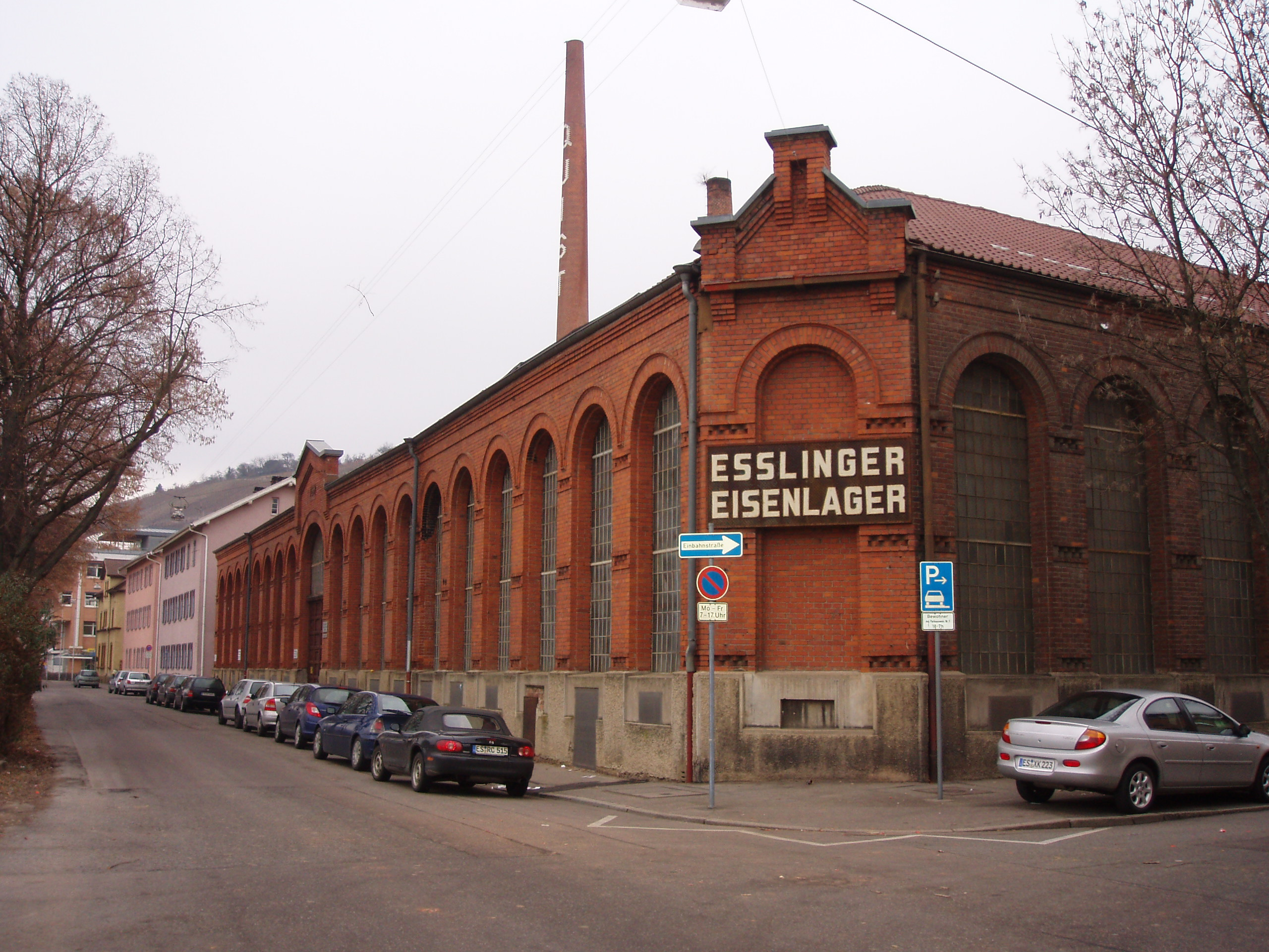 Weststadt Esslingen mit Fabrikschornstein, Fleischmannstraße 20